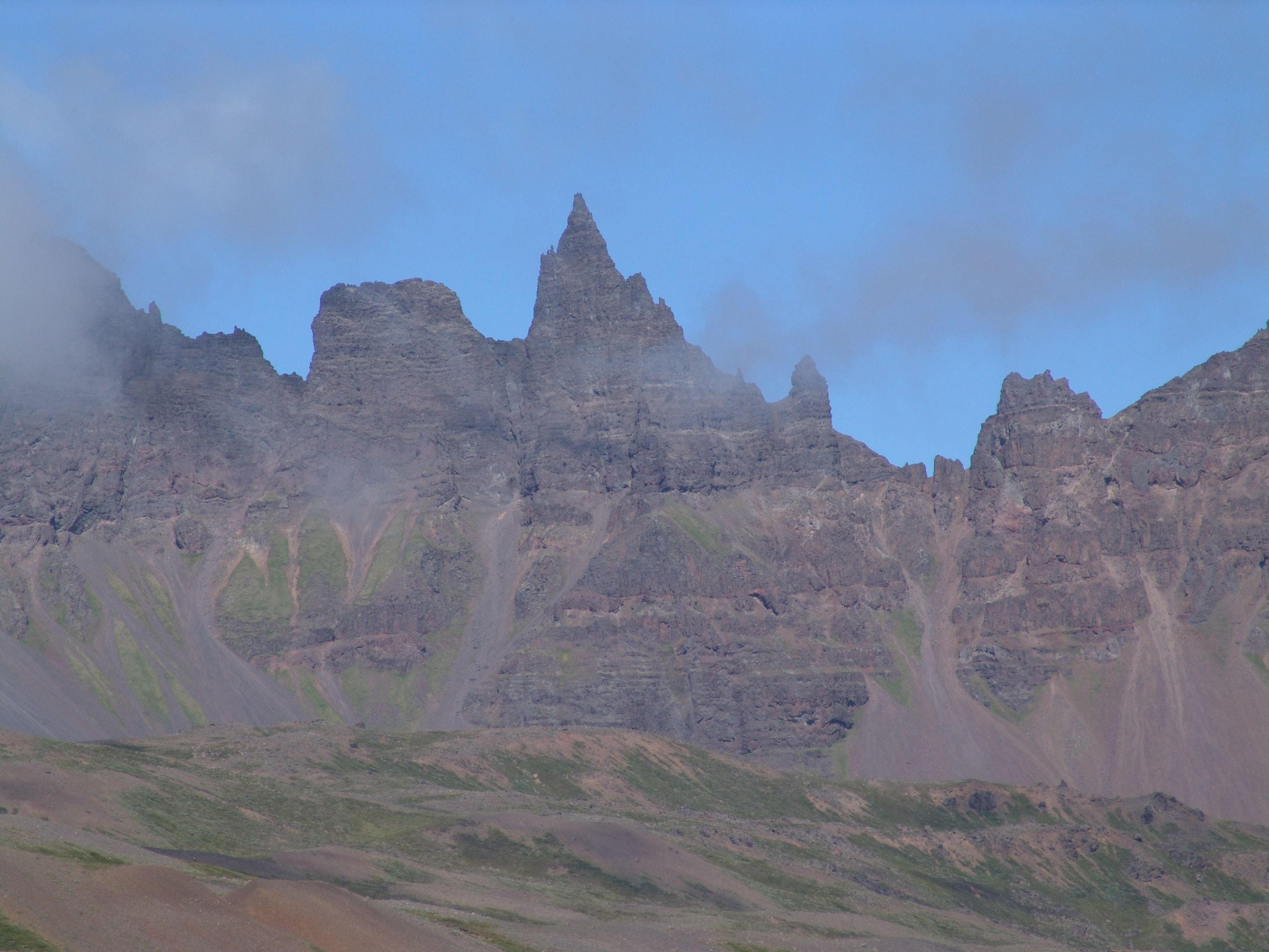 Island, Landschaft.